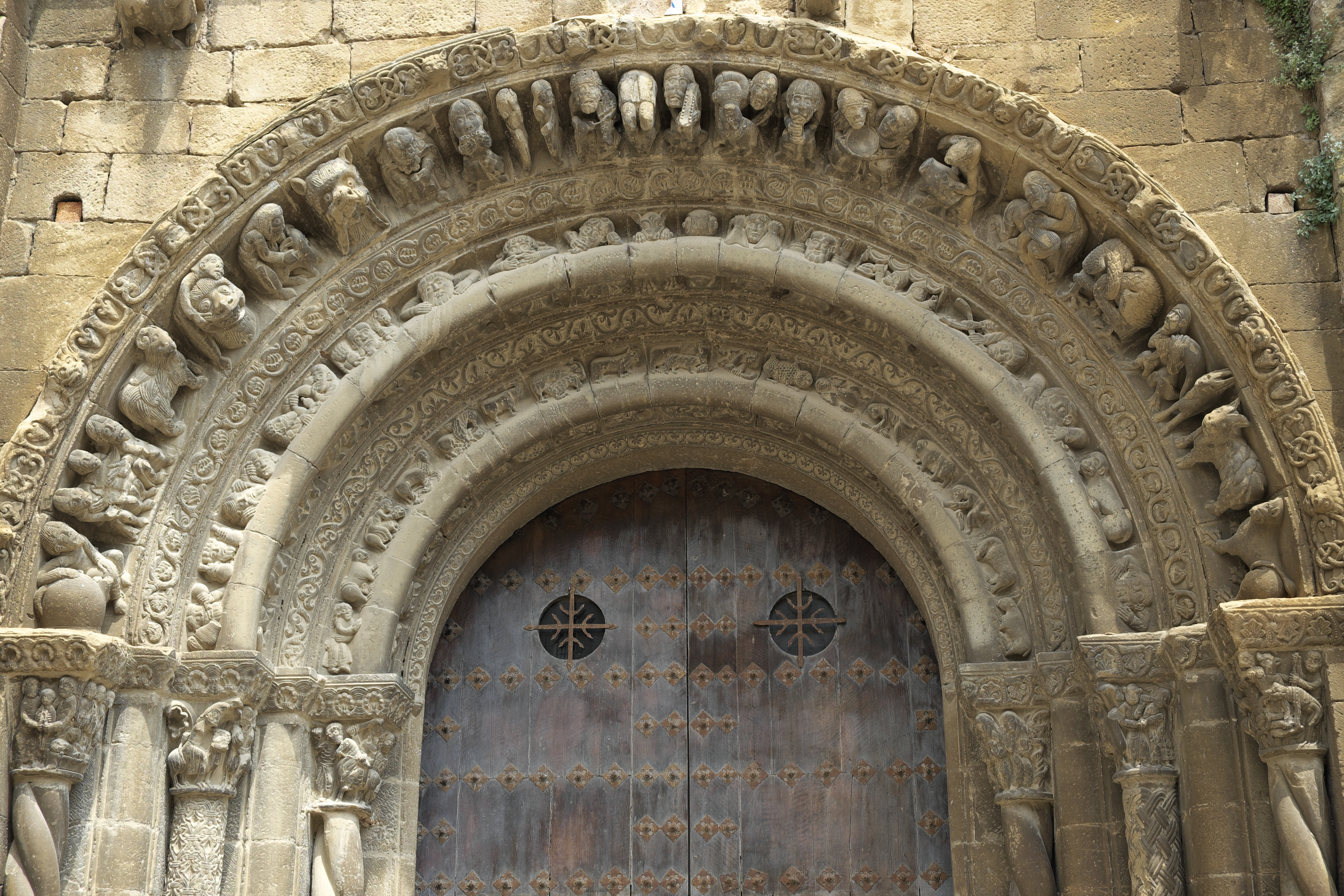 Katholische Pfarrkirche Santa María la Mayor in Uncastillo in der Provinz Saragossa (Aragón/Spanien), Archivolten des Südportals